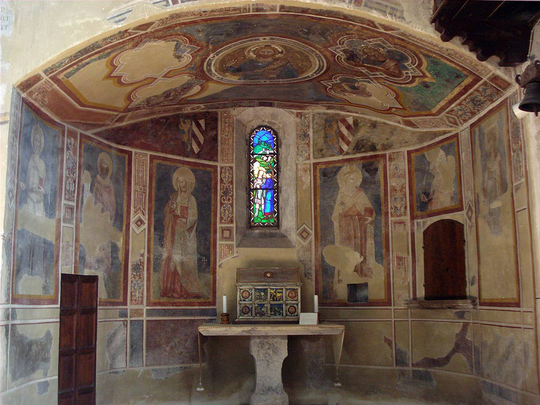 Interior da Igreja de S. Francisco, Gubbio. Detalhe da abside direita, com afrescos atribuídos a Guido Palmeruccio.